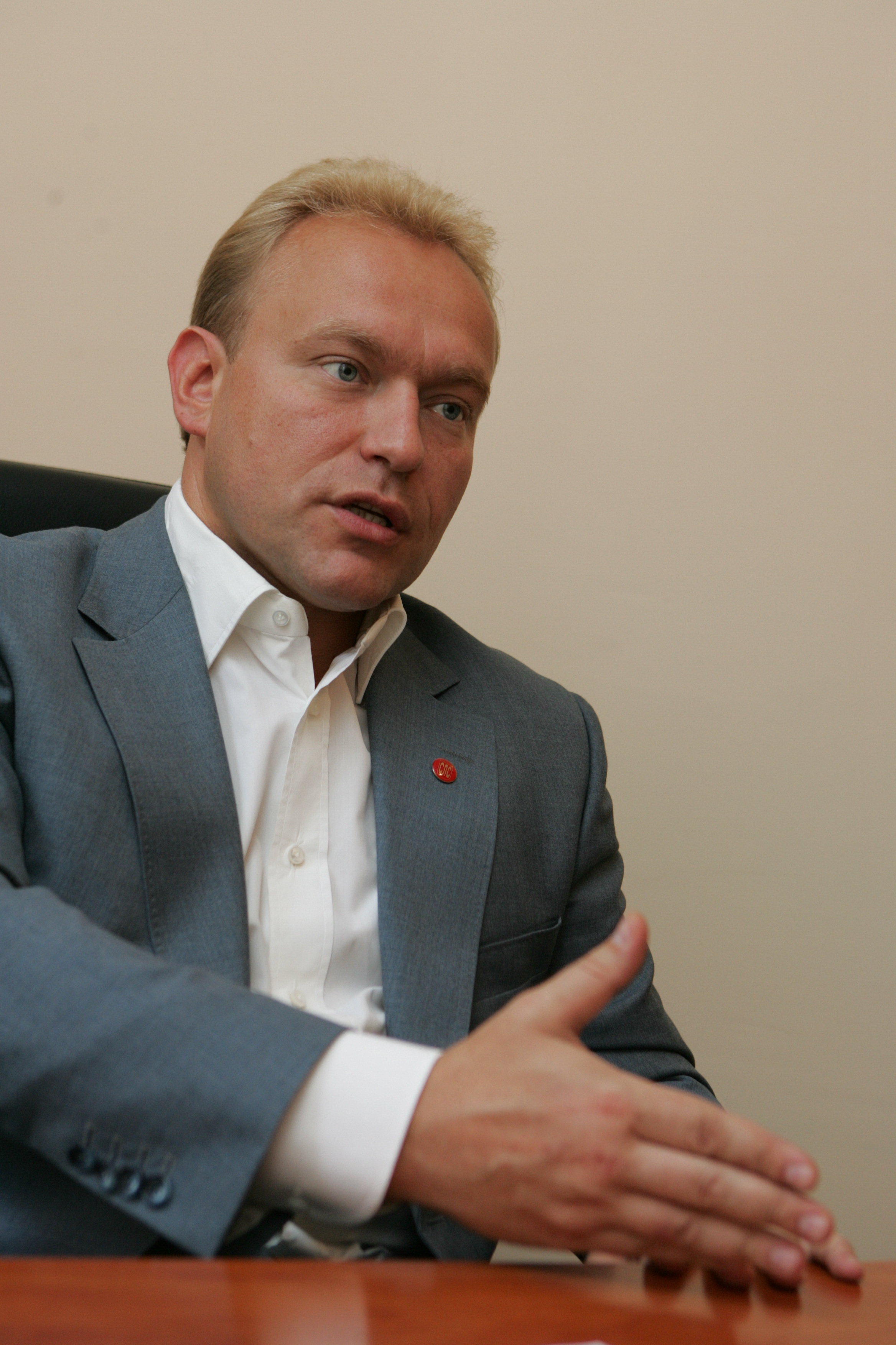 Василий Волга